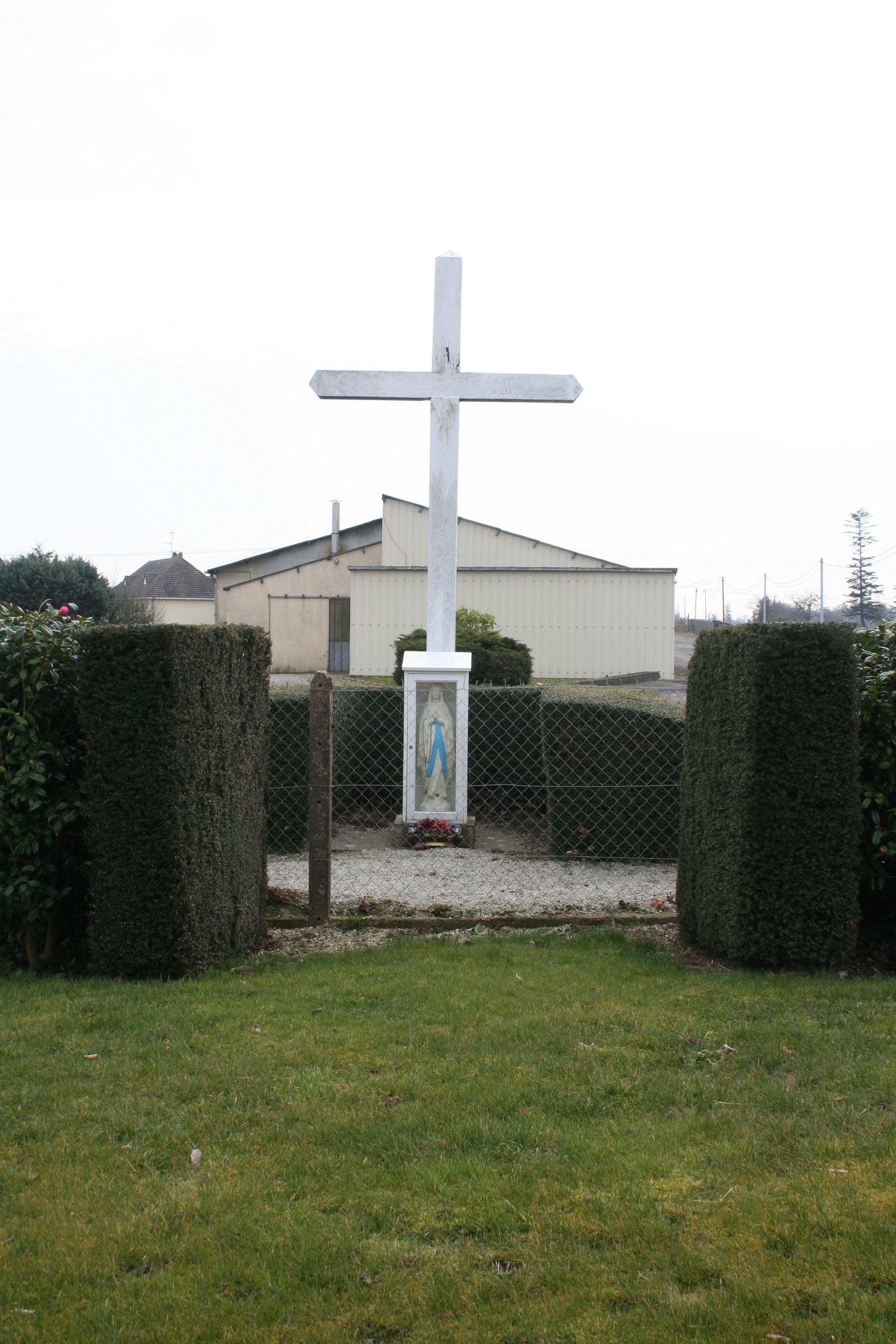 croix situé à l'emplacement de la chapelle de la maladrerie de la madeleine, Le Teilleul, Manche, France